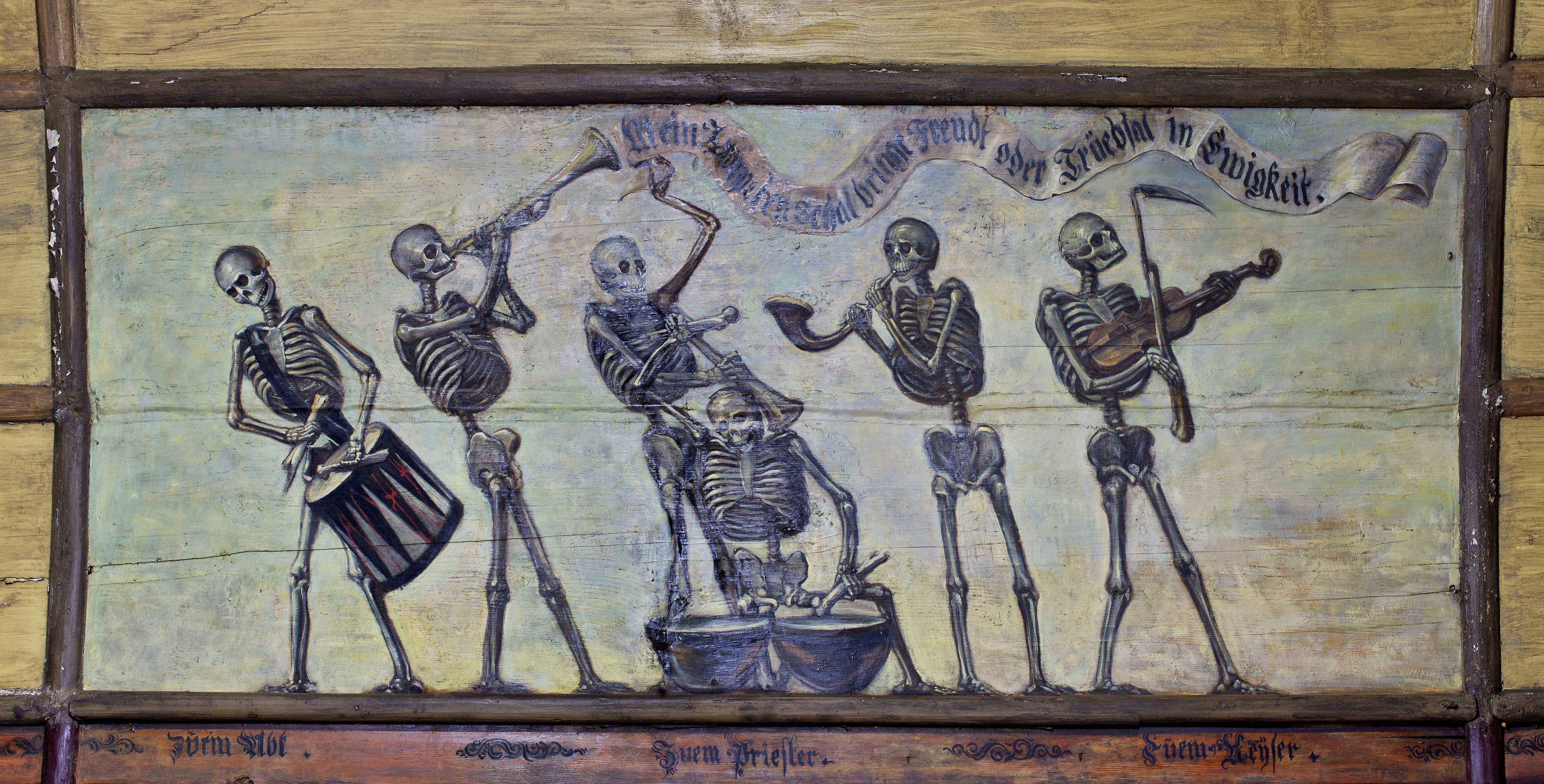 Die Kapelle die zum Tanz aufspielt auf der Südseite des Beinhauses